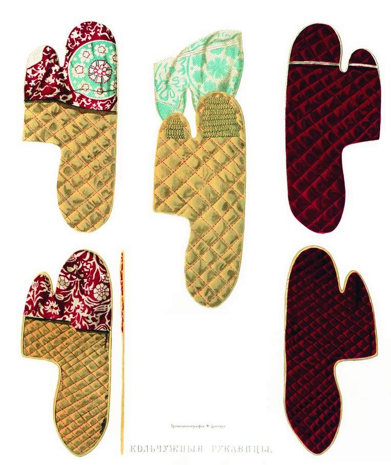 Кольчужные рукавицы